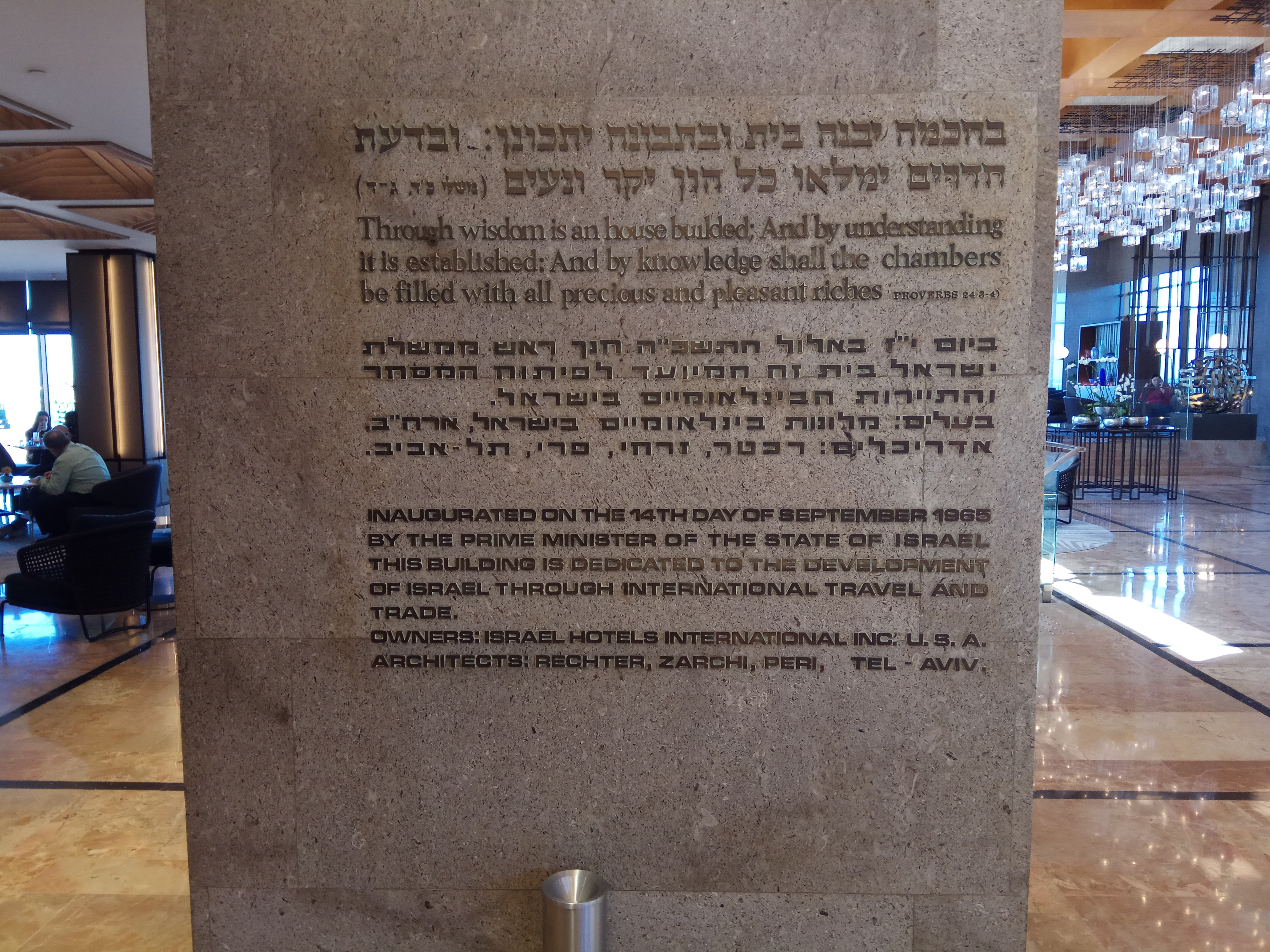 כתובת הקדשה בהילטון תל אביב